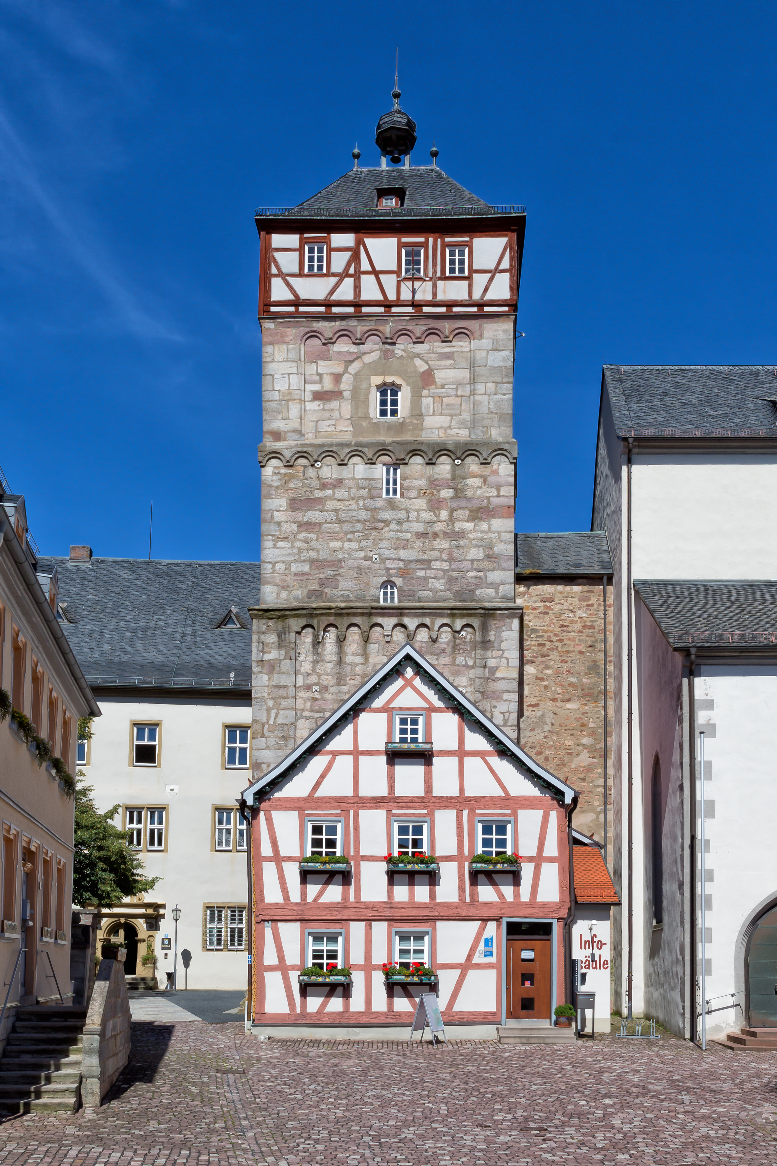 Bischofsheim an der Rhön - Zentturm - 2016